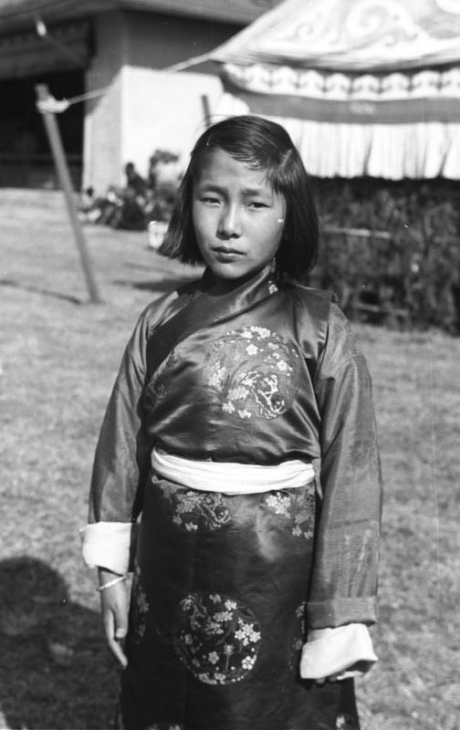 Tibetexpedition, Tochter des Maharaja Die Töchter seiner Hoheit [Tochter des Maharaja (Maharadscha) von Sikkim; Kind]